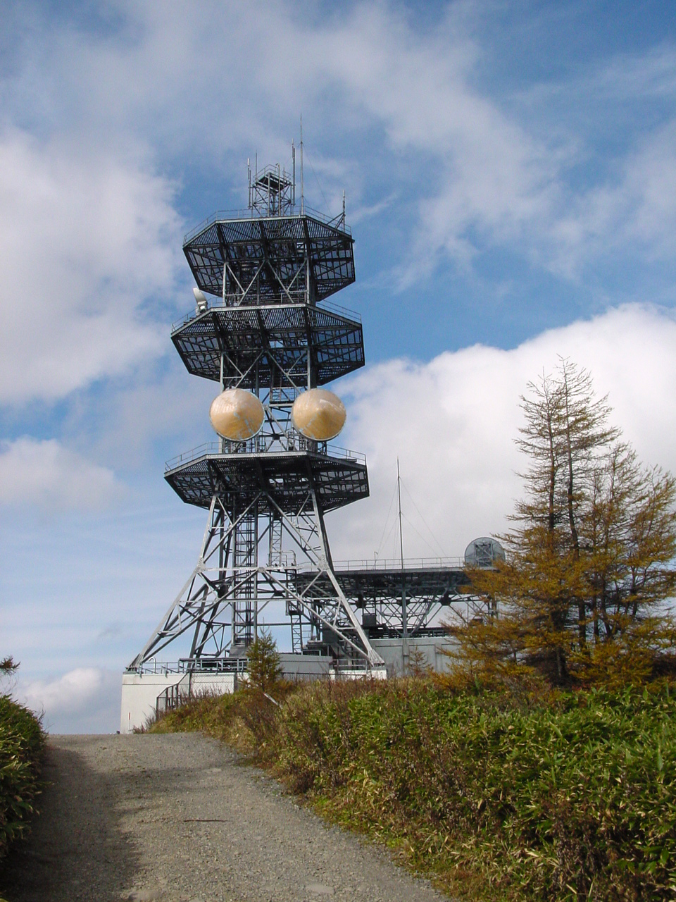 美ヶ原高原王ヶ鼻に設置されたNTT無線中継所2005年10月撮影